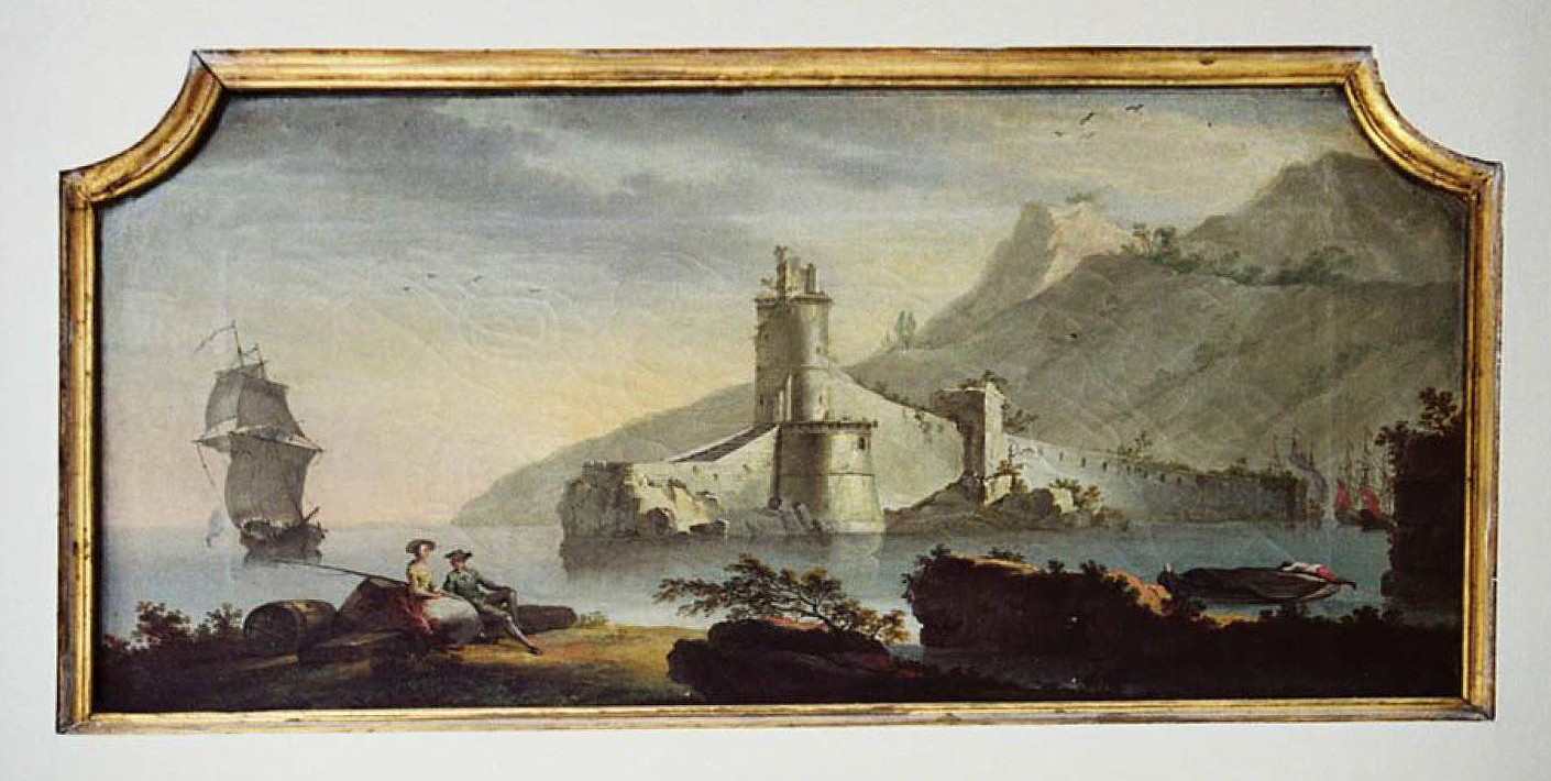 Dörröverstycke på Kristinebergs slott